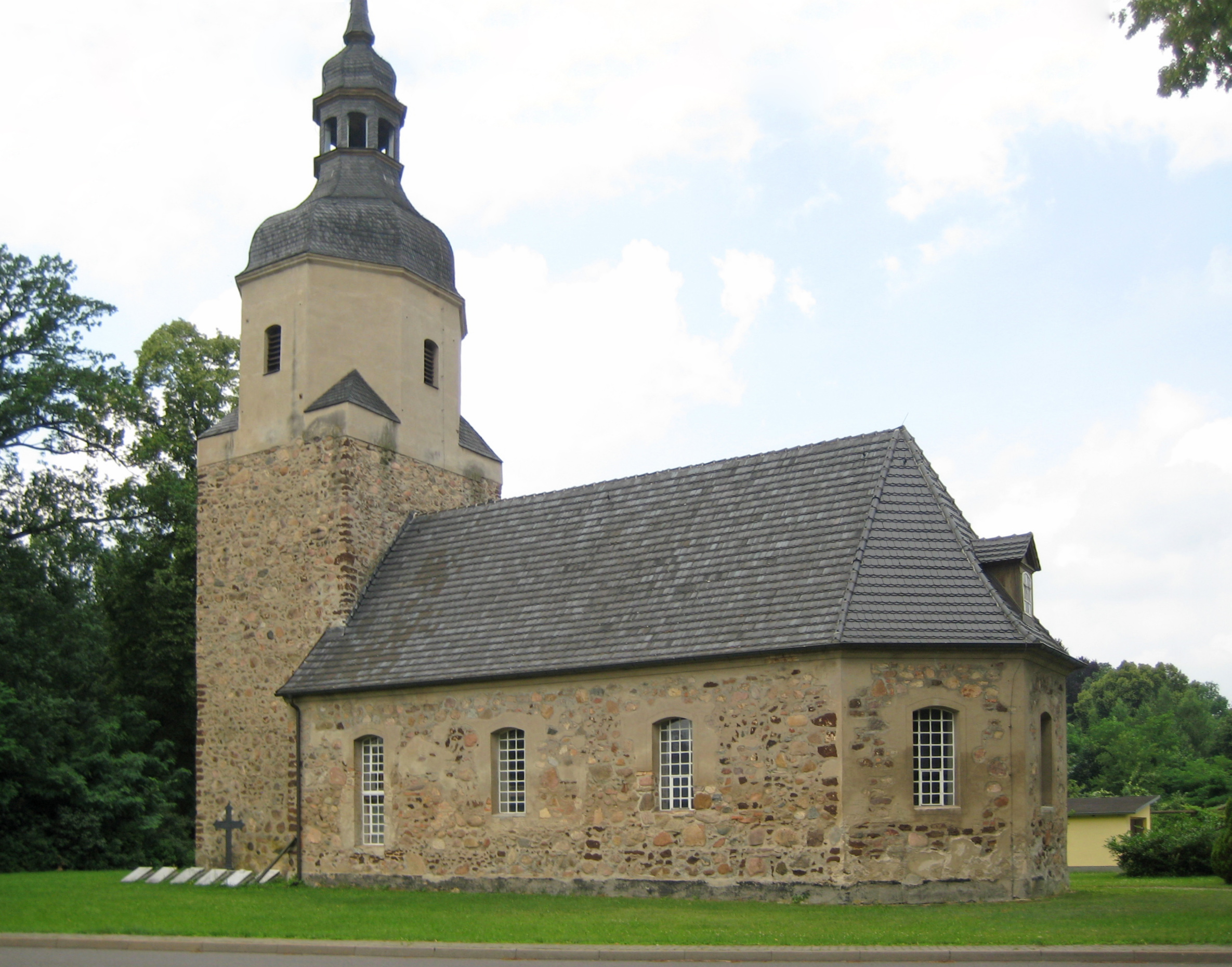 Dorfkirche Krossen, Gemeinde Drahnsdorf, Deutschland